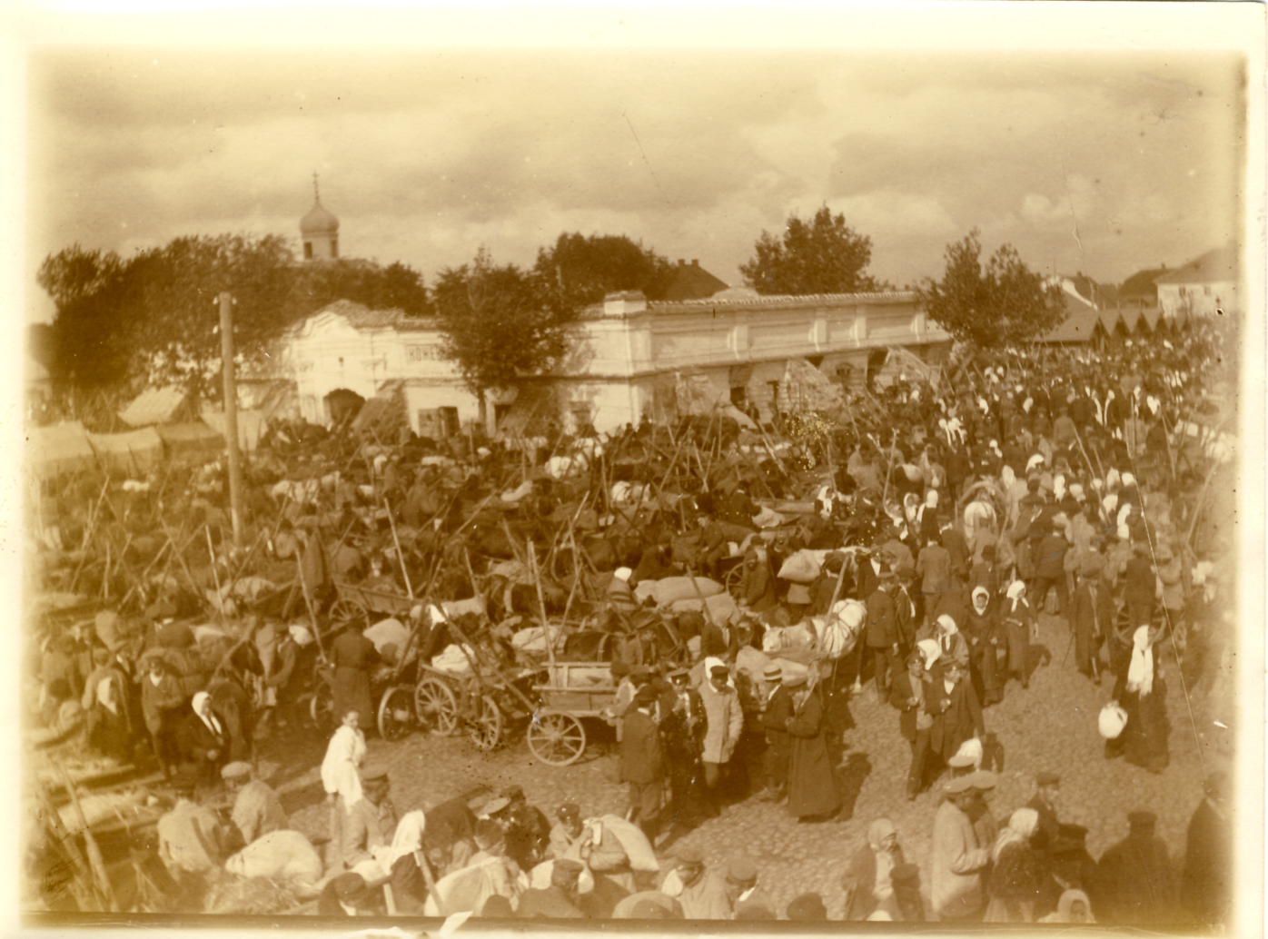 Беларуская (тарашкевіца): Паставы (Pastavy), пляц Стары Рынак (plac Stary Rynak)